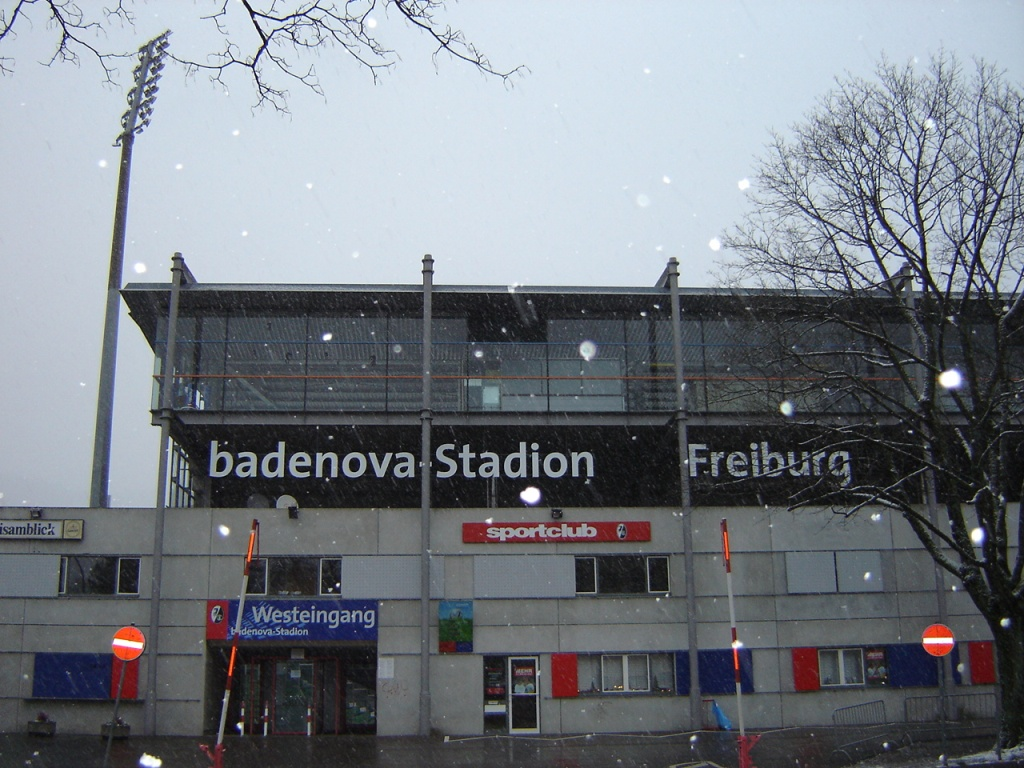 Badenova-Stadion (ehemals Dreisamstadion) Außenansicht.